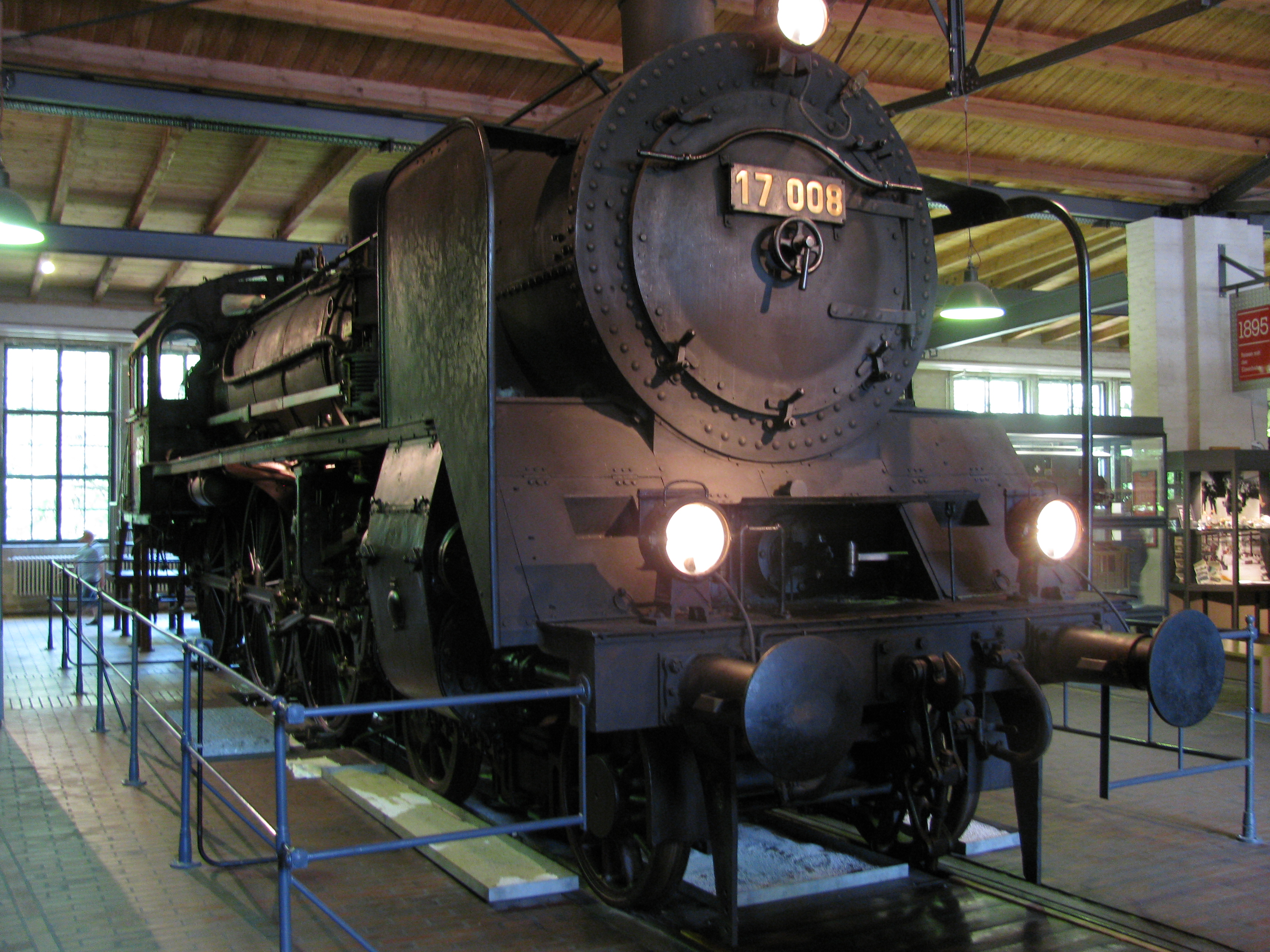 S 10 von 1911, in Dienst gestellt als "Breslau 1008" und ab 1925 als "17 008" geführt. 1933 im Hauptbahnhof Düsseldorf stationiert, 1934 ausgemustert und im Ausbesserungswerk Brandenburg-West als Ausstellungsstück hergerichtet. Vom 11. März 1935 bis zum 5. Juni 1985 im Verkehrs- und Baumuseum Berlin, heute im Deutschen Technikmuseum Berlin.